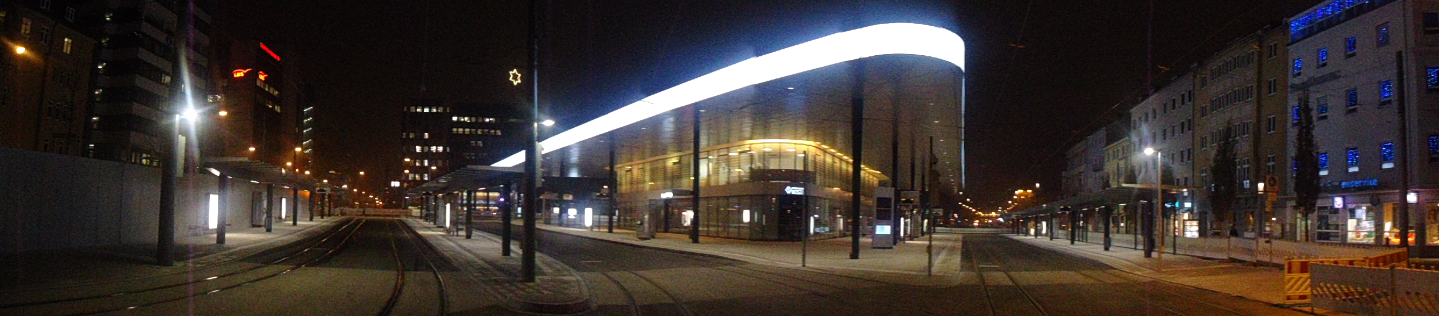 Augsburger Könisgplatz bei Nacht (wenige Tage vor Eröffnung)